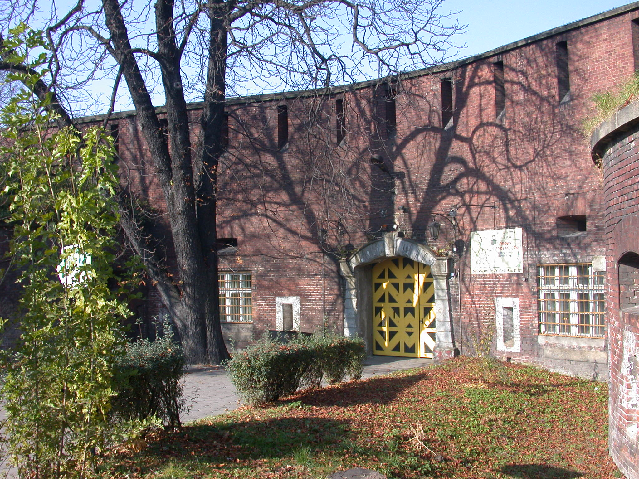 Festung Krakau - Twierdza Kraków - Fort Kleparz